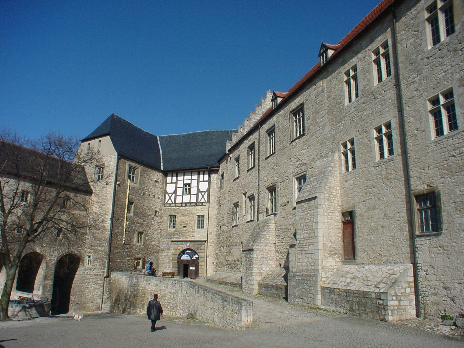 Vorhof der Kernburg. Eigenes Foto von 2003, public domain. Eingestellt von Mewes